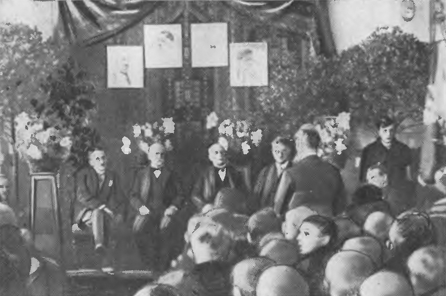 Uroczystość pożegnania przechodzących w stan spoczynku profesorów VIII Gimnazjum Matematyczno-Przyrodniczego im. Augusta Witkowskiego w Krakowie (Tadeusz Borowiczka, Jan Kmietowicz, Józef Flach, dr Stanisław Zathey, Sylweriusz Saski).